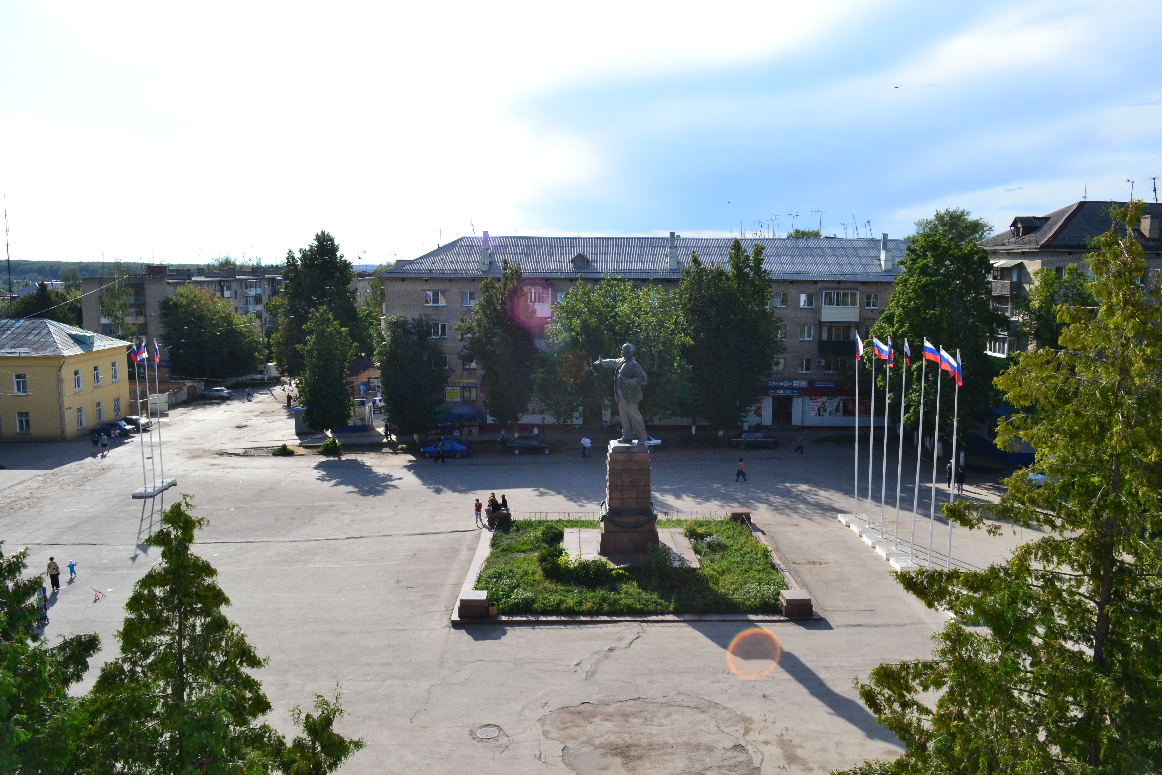 Тульская область, г. Ясногорск. Площадь Ленина.